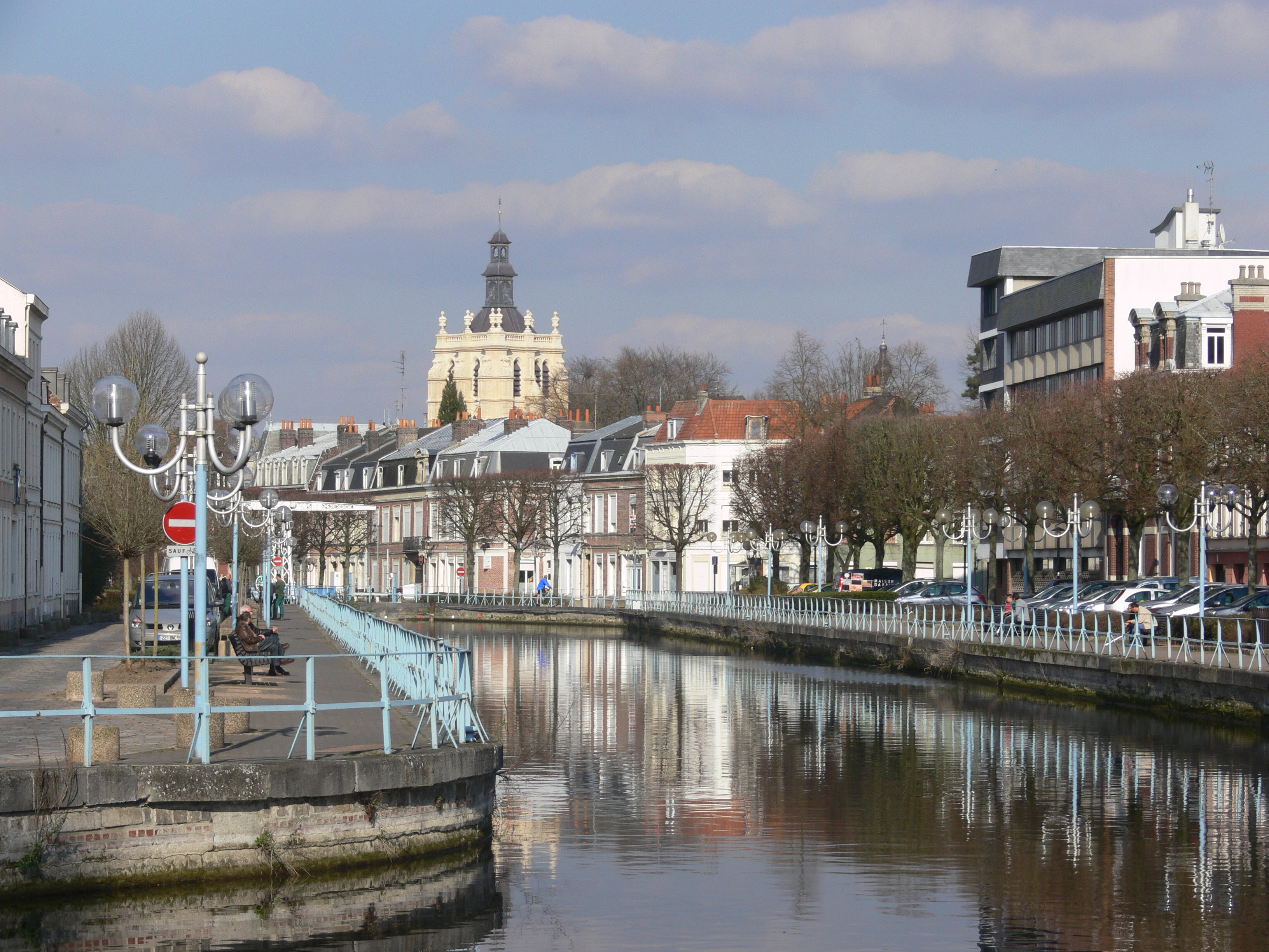 Douai - Scarpe et clocher de la collégiale Saint-Pierre